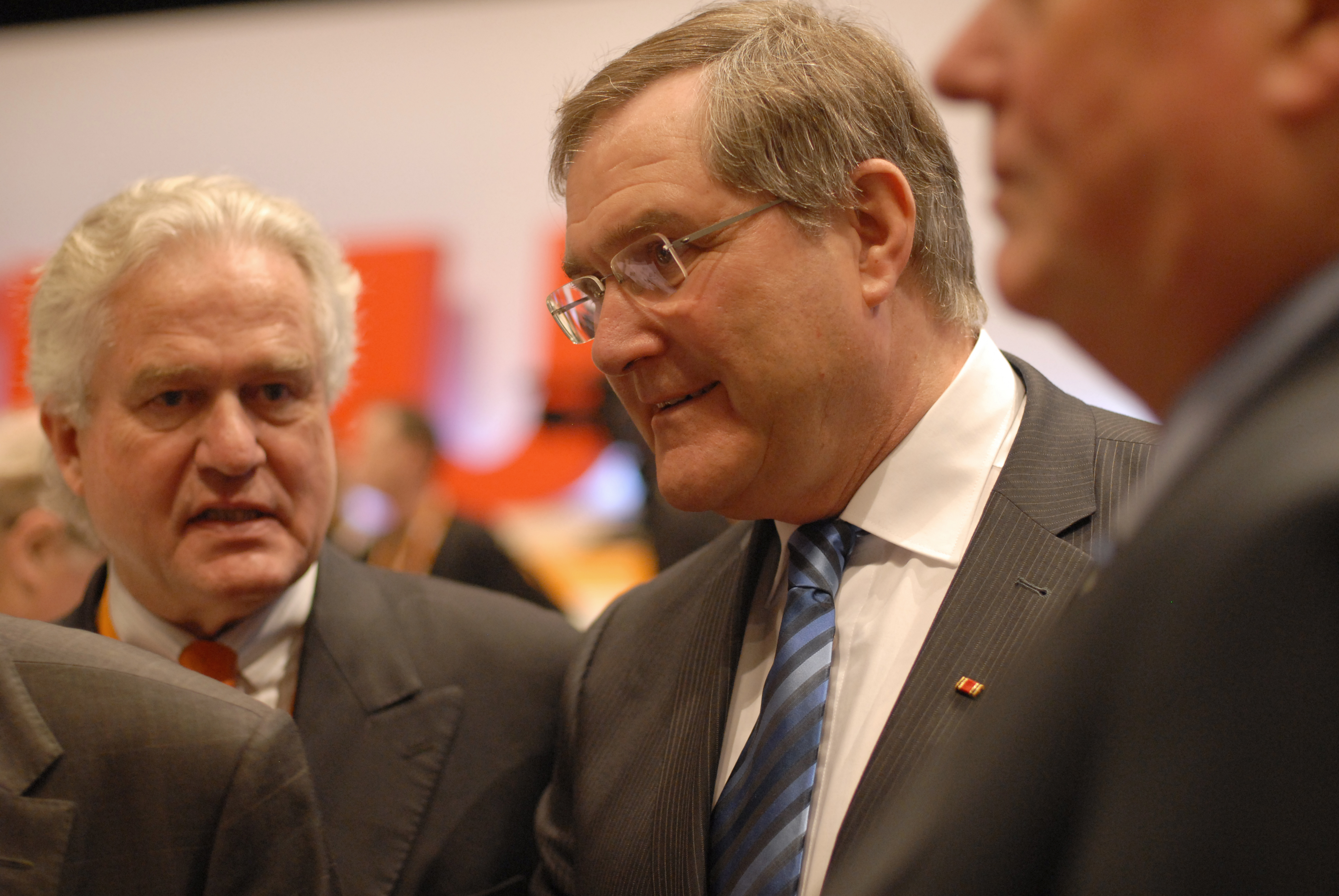 Franz Josef Jung auf dem CDU-Parteitag